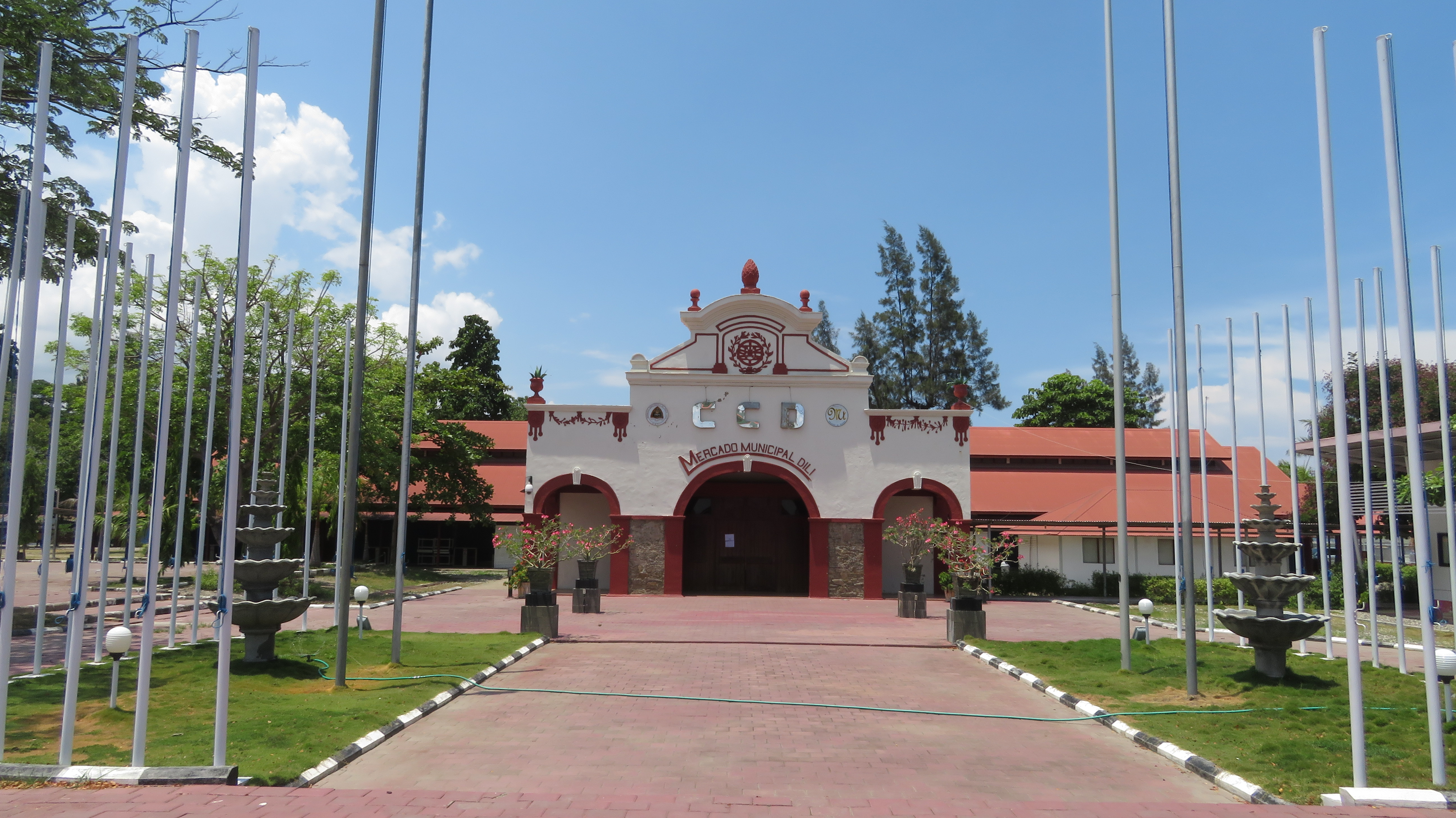 Antigo Mercado Municipal, Dili, Timor Leste